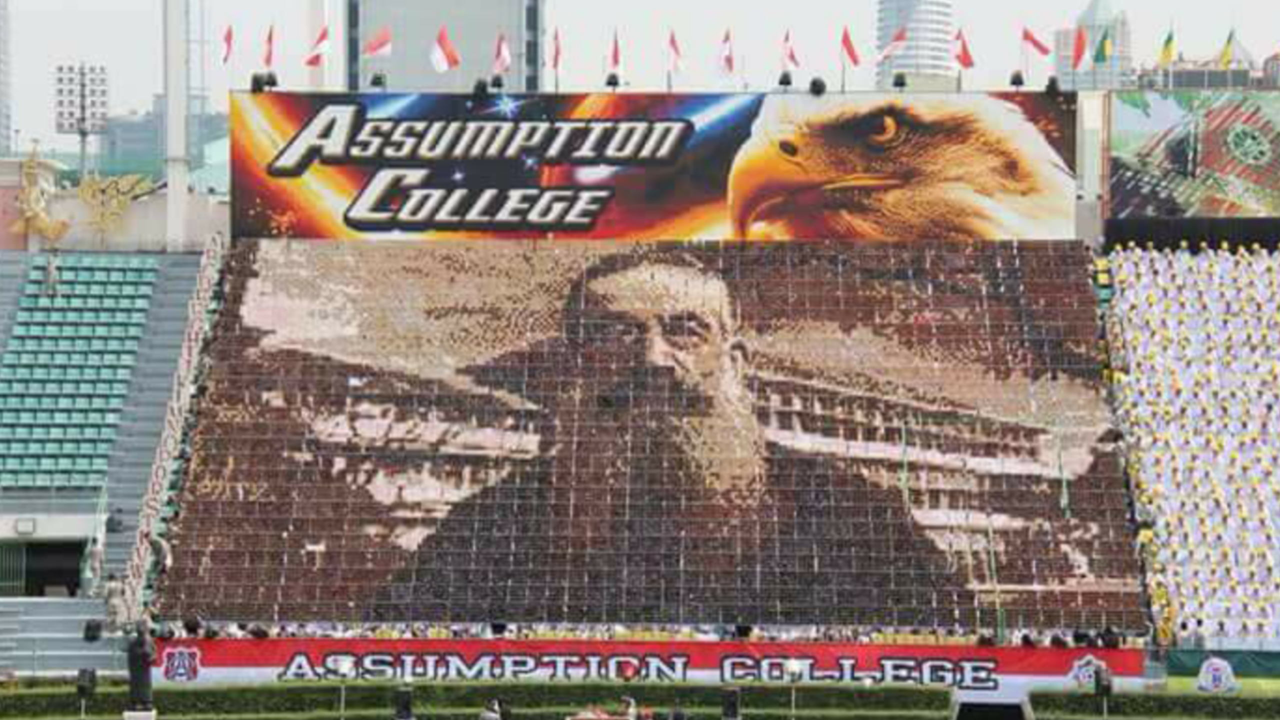 แปรอักษรรูปบาทหลวงเอมิล ออกัสต์ กอลมเบต์ สแตนด์โรงเรียนอัสสัมชัญ ในงานฟุตบอลประเพณีจตุรมิตรสามัคคี พ.ศ. 2560